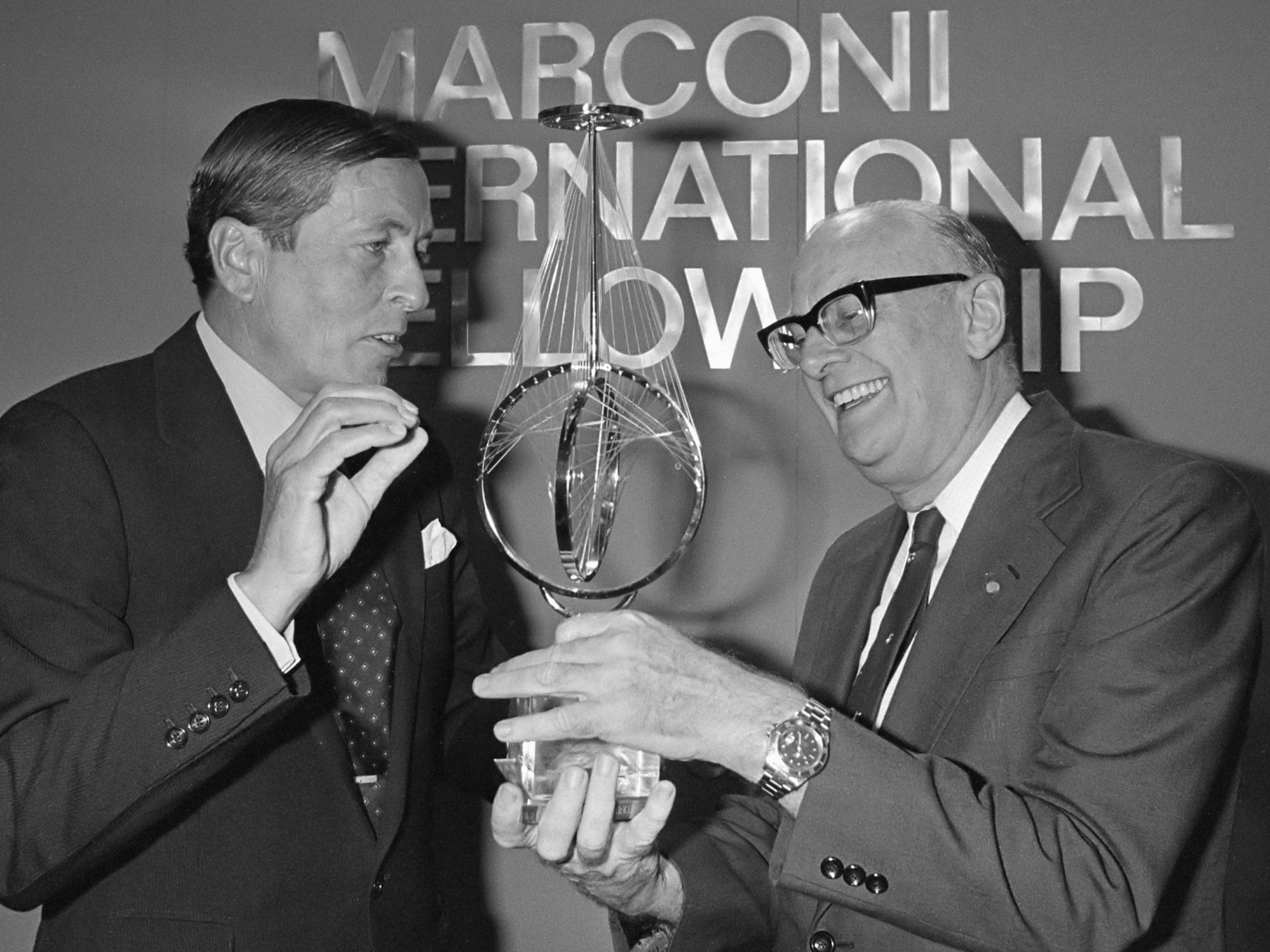 Prins Claus overhandigt Arthur C. Clarke de Marconi International Fellowship Award 1982 11 juni 1982